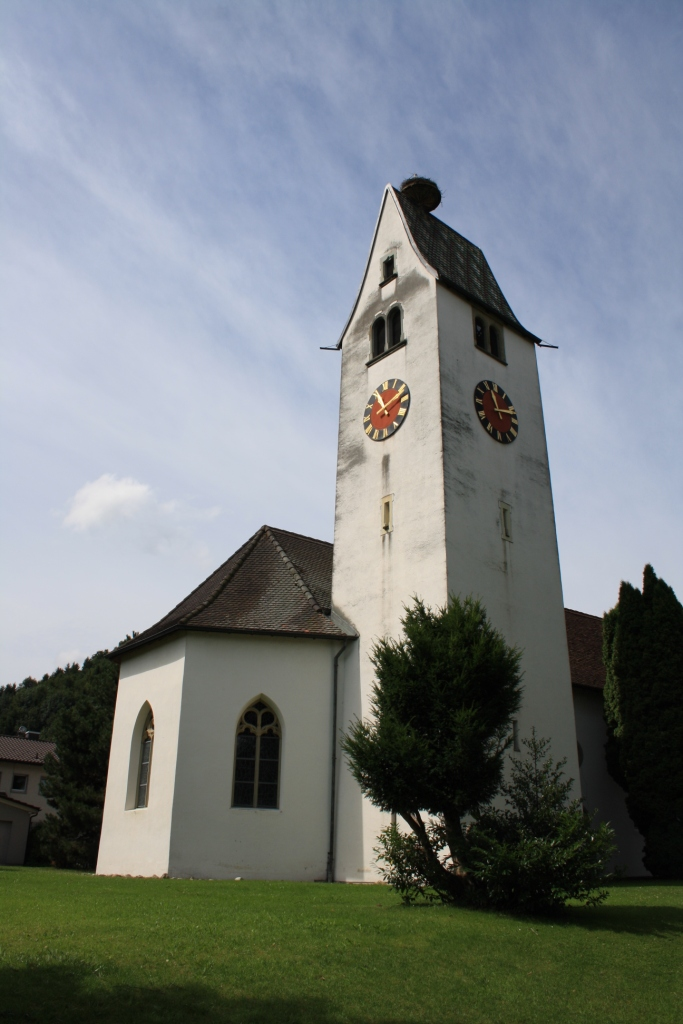 Kirche Brittnau